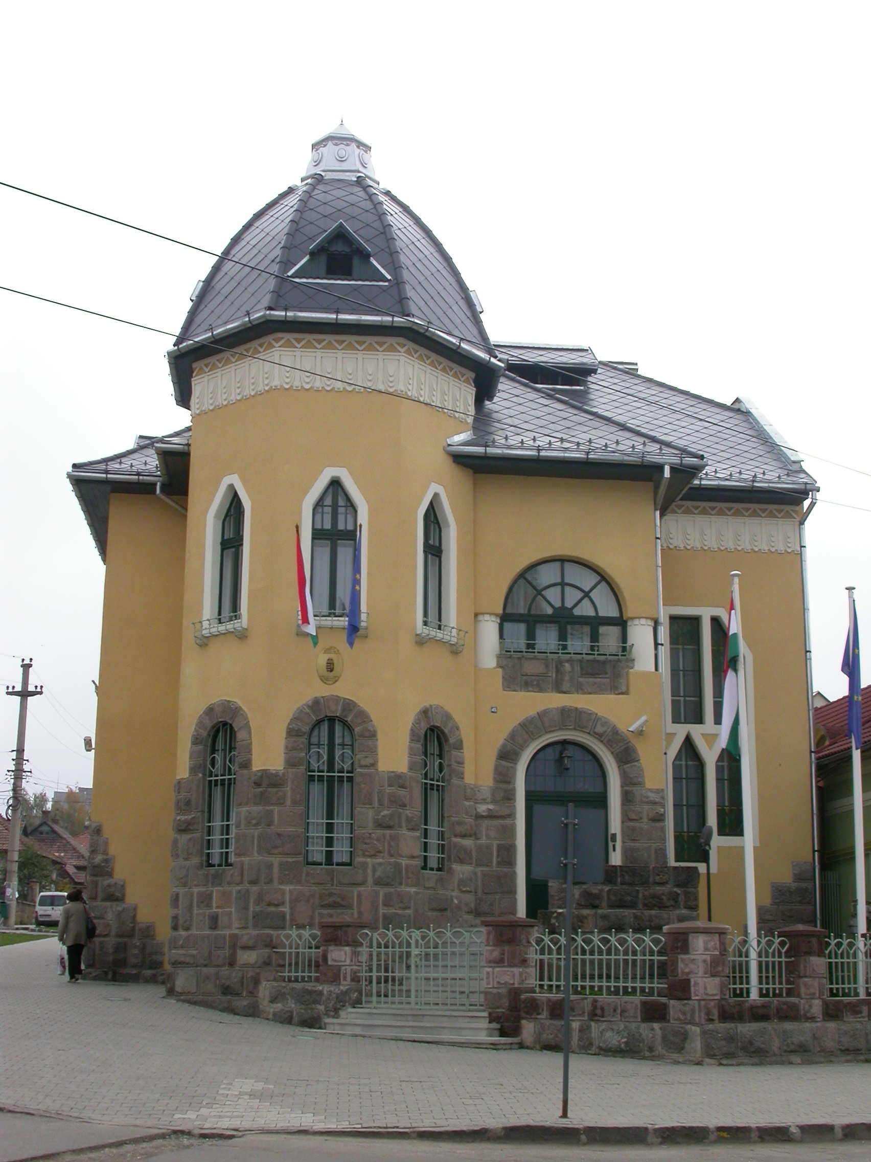 Ansamblu urban, sf. sec. XIX -înc. sec.